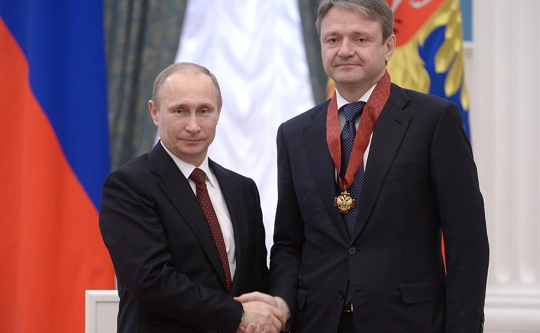 Вручение государственных наград Российской Федерации. Глава администрации (губернатор) Краснодарского края Александр Ткачёв награждён орденом «За заслуги перед Отечеством» II cтепени.